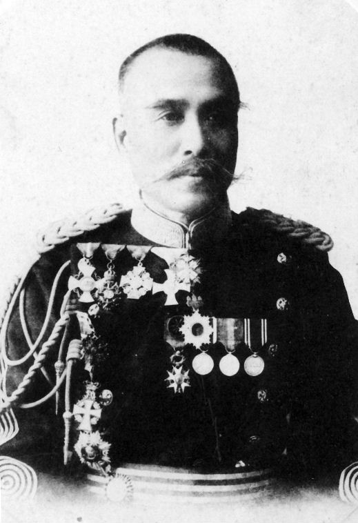 a Japanese man 立見尚文 (Naofumi Tatsumi)